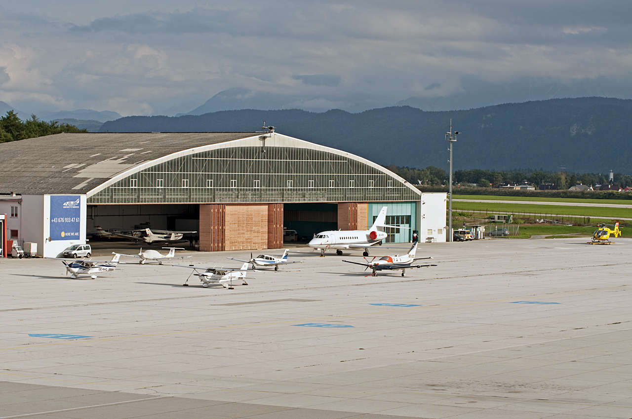 Klagenfurt Airport - Blick auf Hangar, General Aviation-Bereich und Heliport Camera data Camera: Nikon D90 Lens: Tamron SP AF 70-200mm F/2.8 Di LD [IF] MACRO